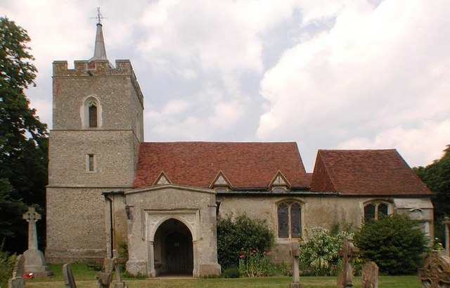 St Mary, Aspenden, Herts